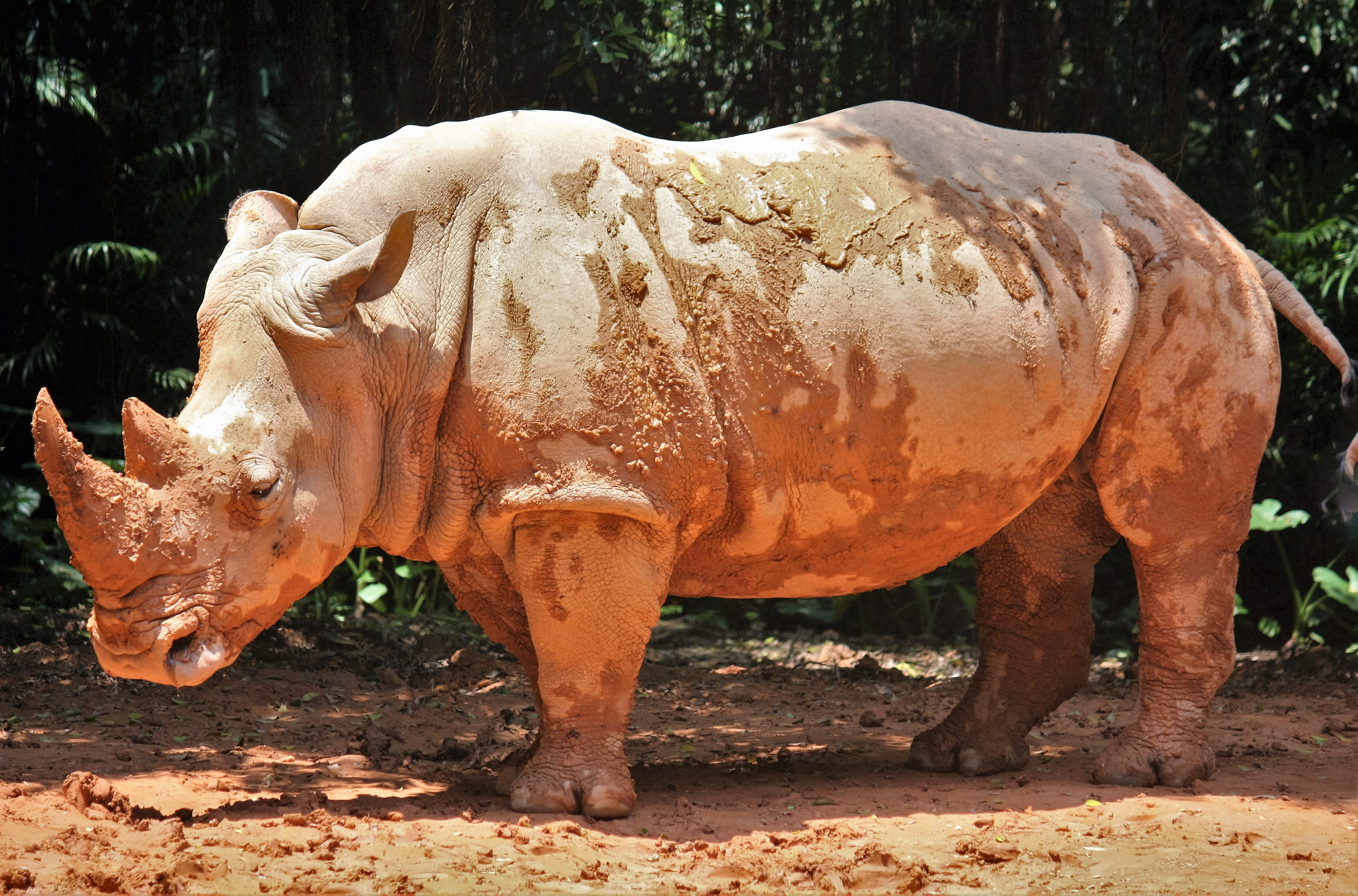 Zoo Guangzhou